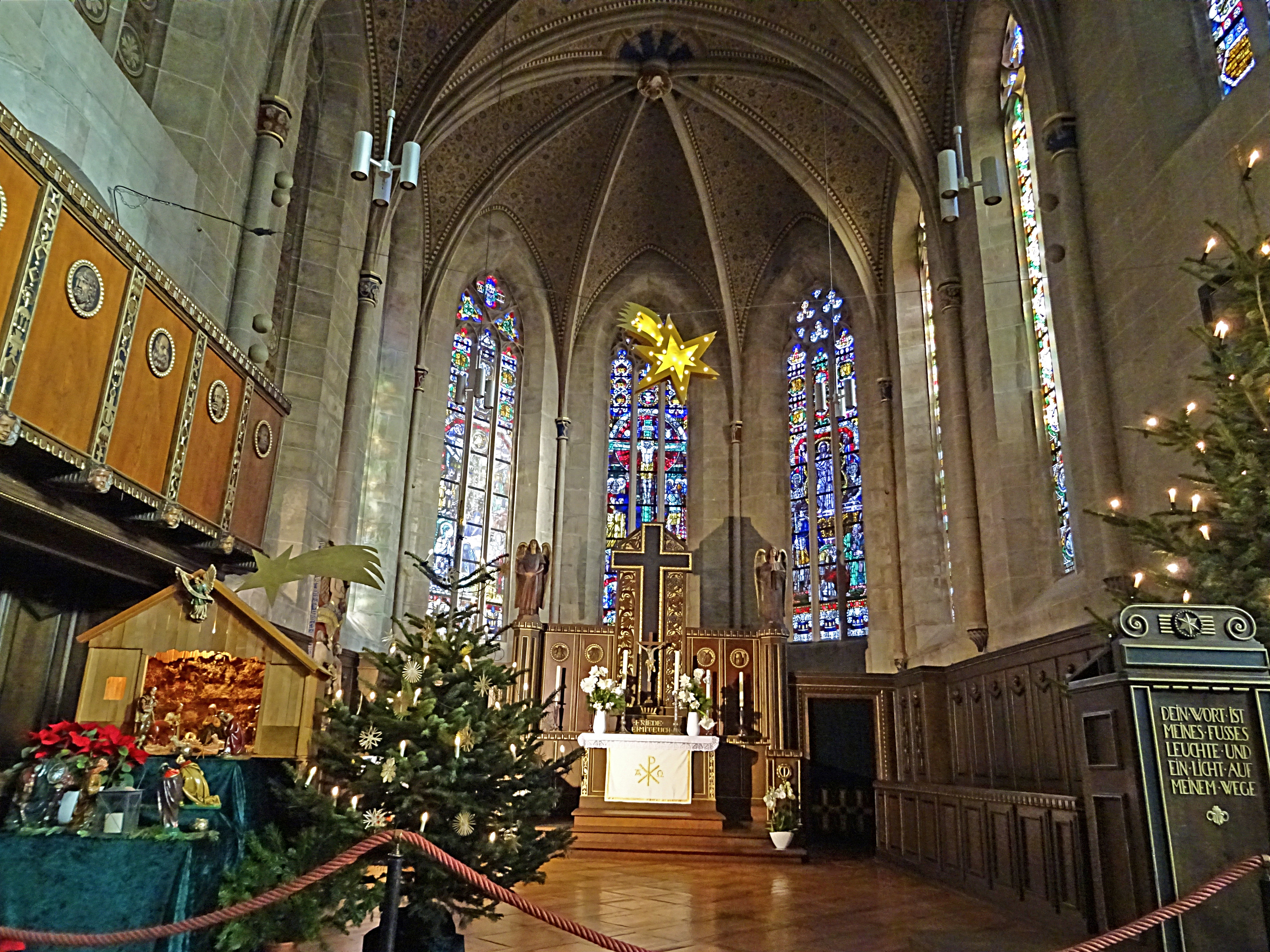 Chor mit Buntglasfenstern in St. Servatius (Duderstadt)